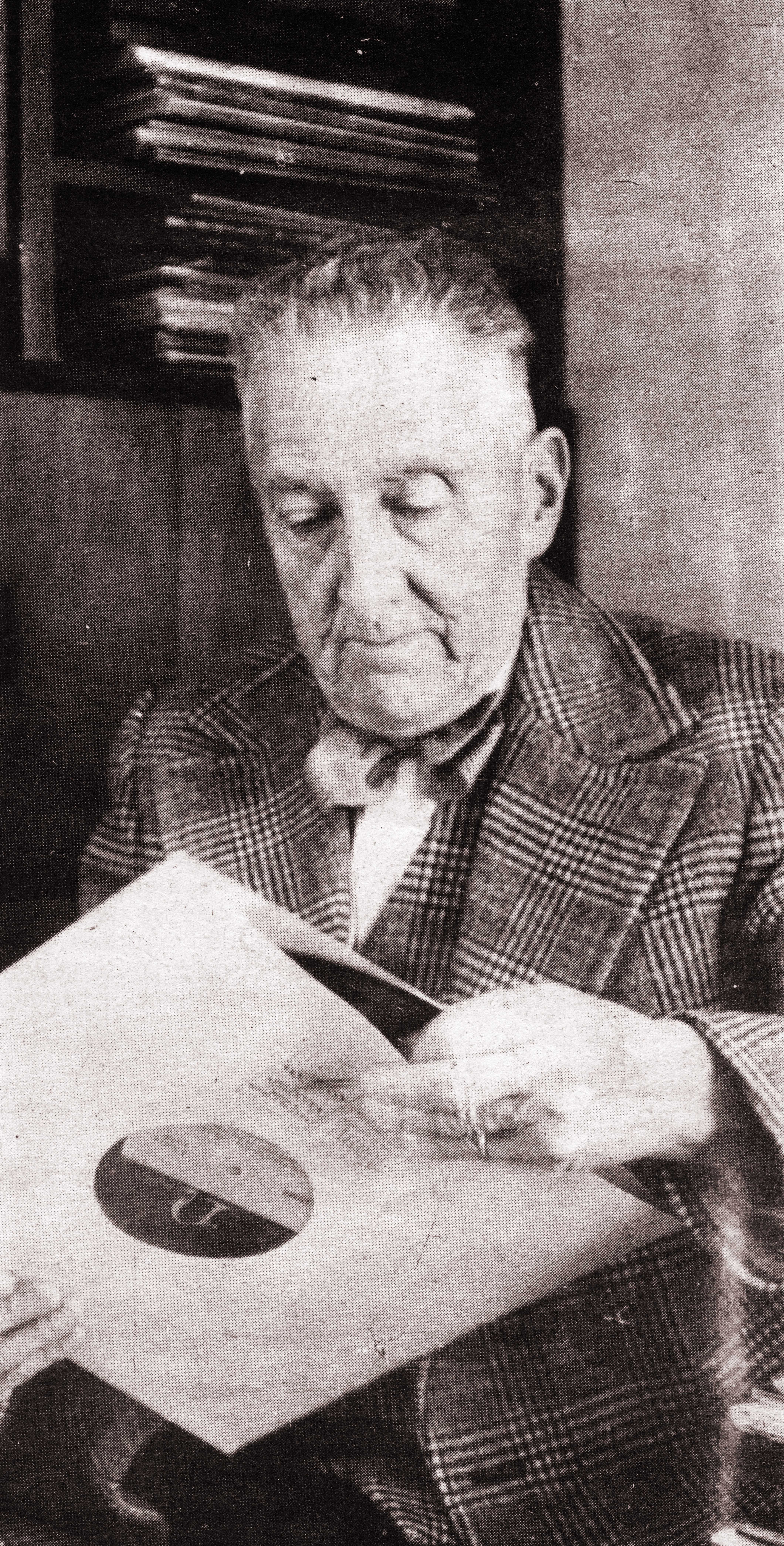 Fondo AH FFMV